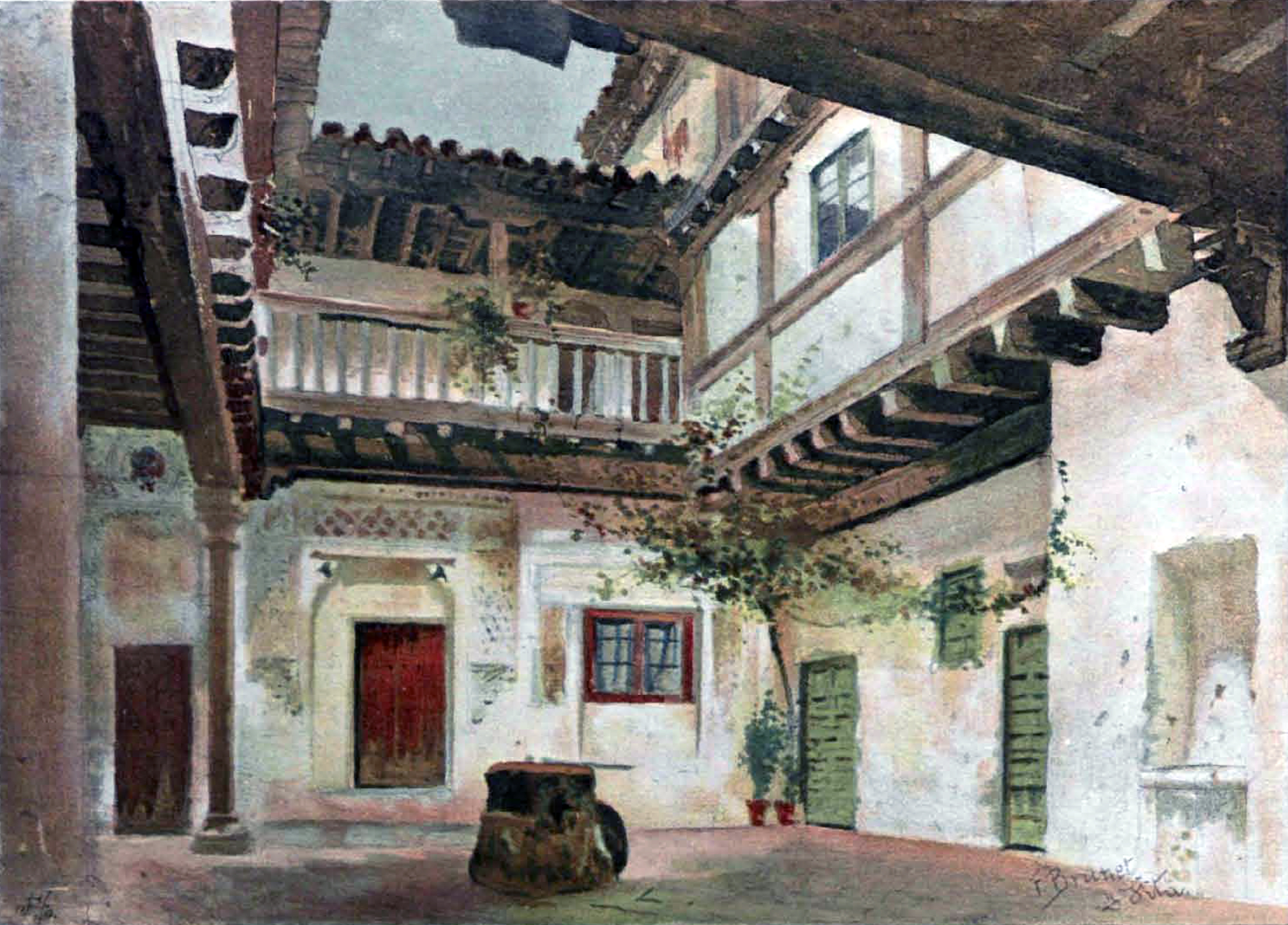 Un patio en el barrio judío (Toledo).